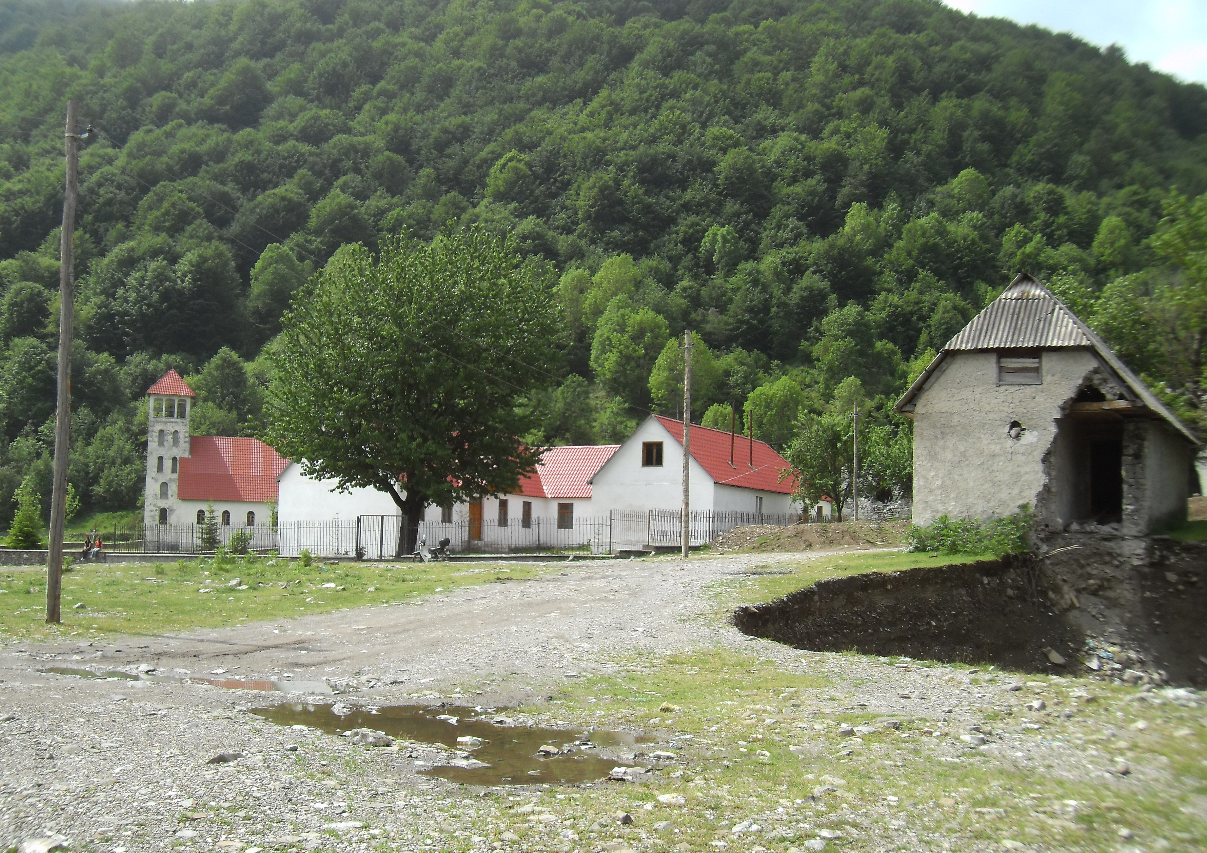 Dorfplatz mit Kirche und Schule in Vermosh, Albanien